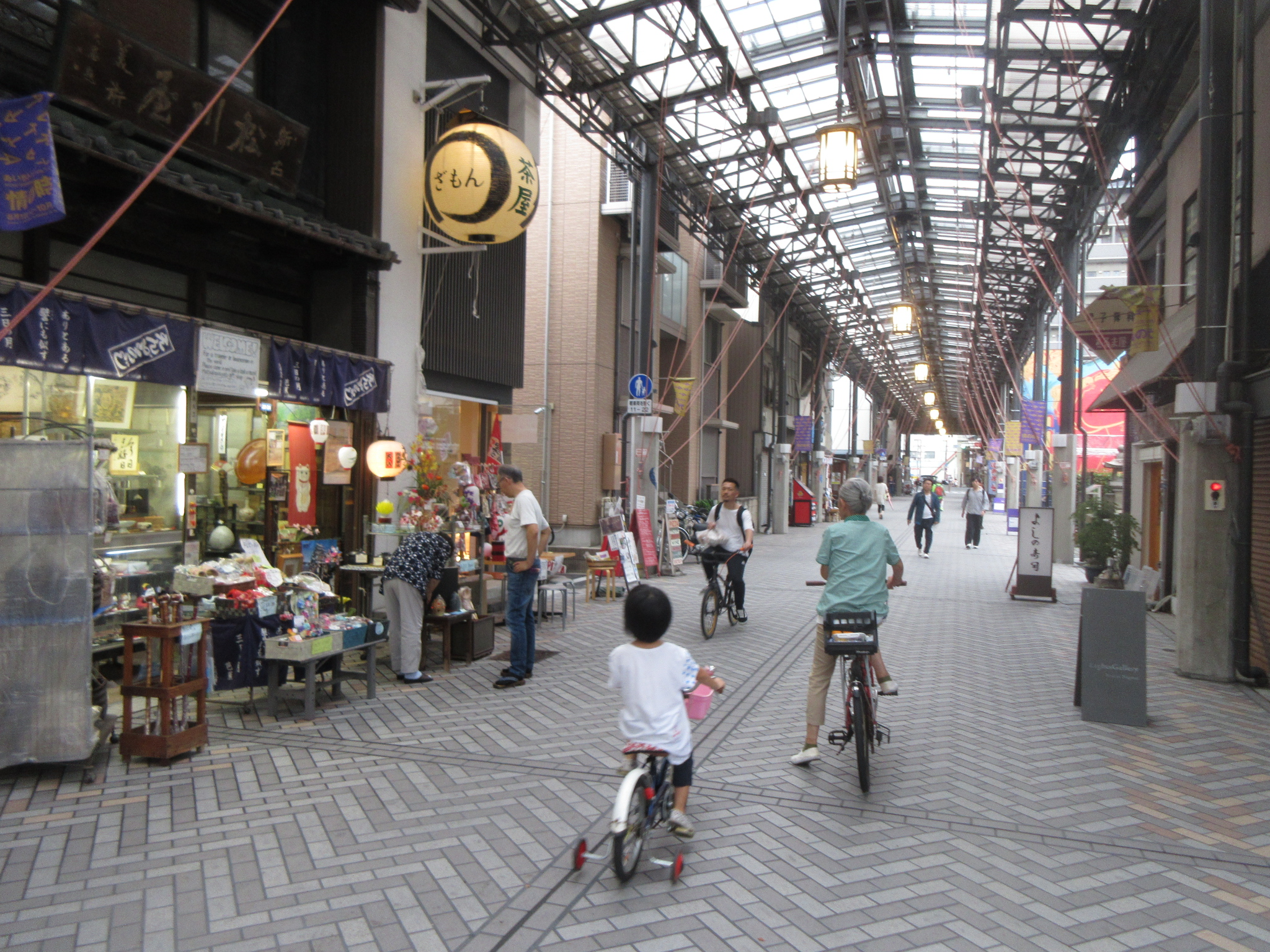 名古屋市西区那古野の円頓寺商店街